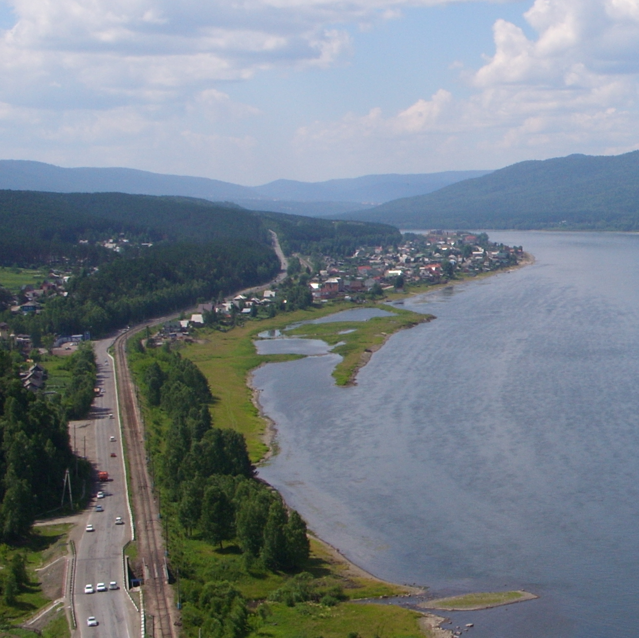 Вид на Енисей вверх по течению со смотровой площадки близ деревни Слизнево, городской округ "Город Дивногорск", Красноярский край, Россия